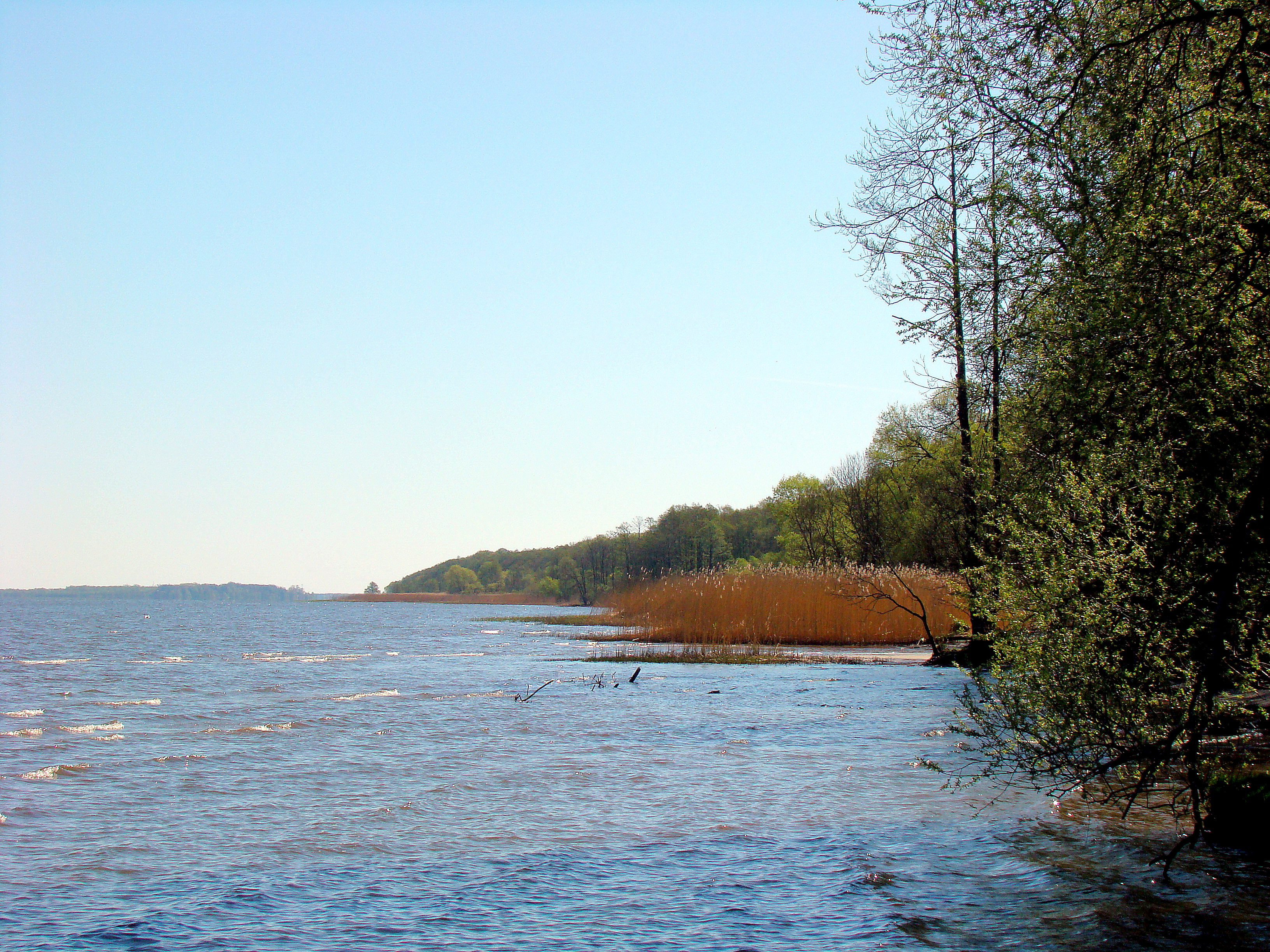 Zalew Szczeciński, zachodni brzeg w tle Puszcza Wkrzańska, (Województwo zachodniopomorskie), Polska